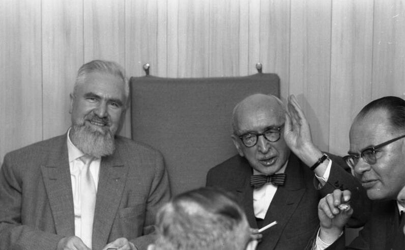 Empfang in der bayerischen Landesvertretung in der Schlegelstraße in Bonn